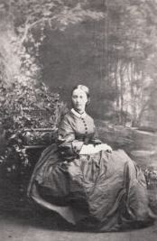 Maria Sidonia von Sachsen